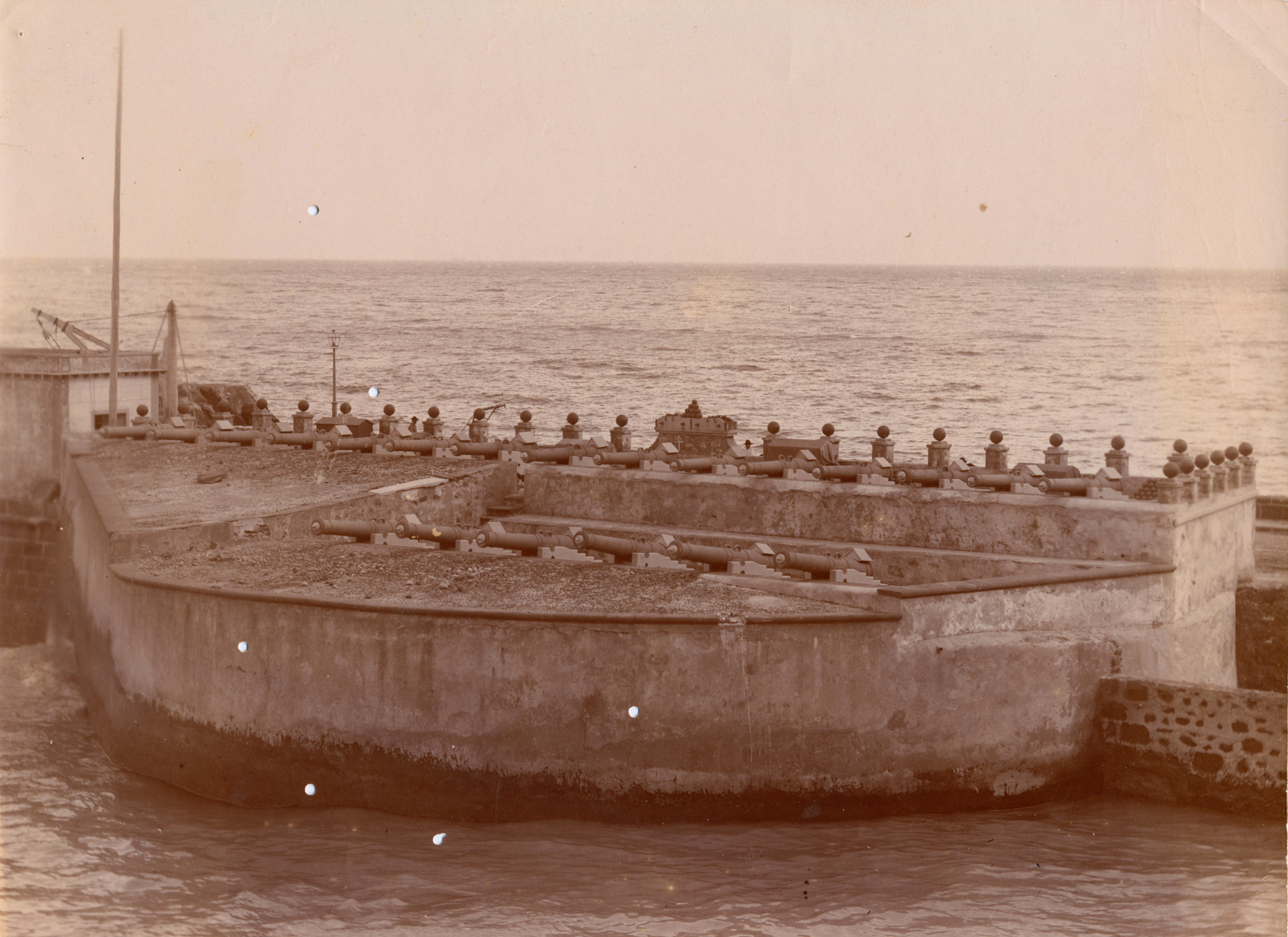 Cubelo de Santa Ana o Torre de Santa Ana. Las Palmas de Gran Canaria (Gran Canaria). Islas Canarias, España.